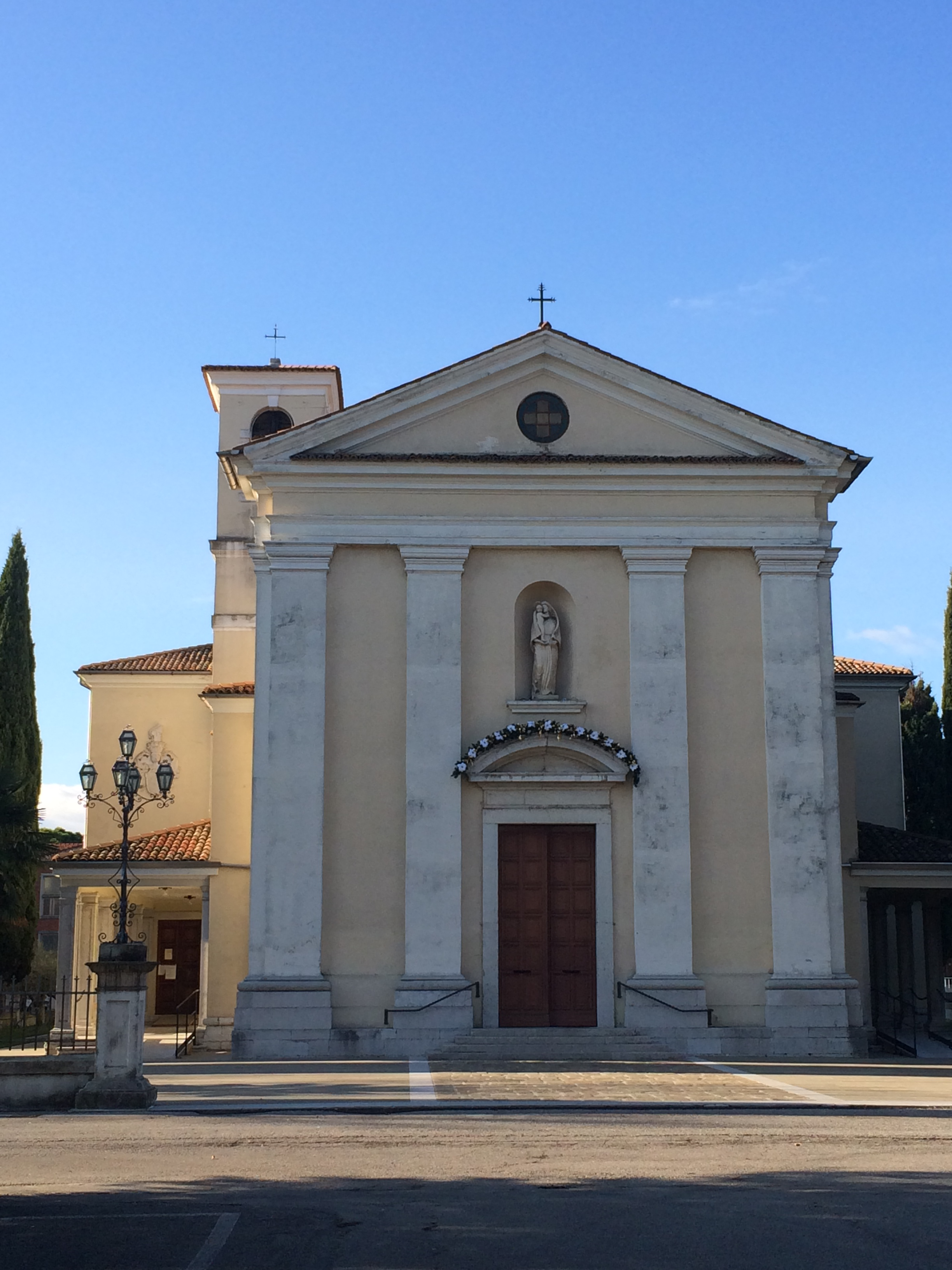 chiesa di Torviscosa (UD)